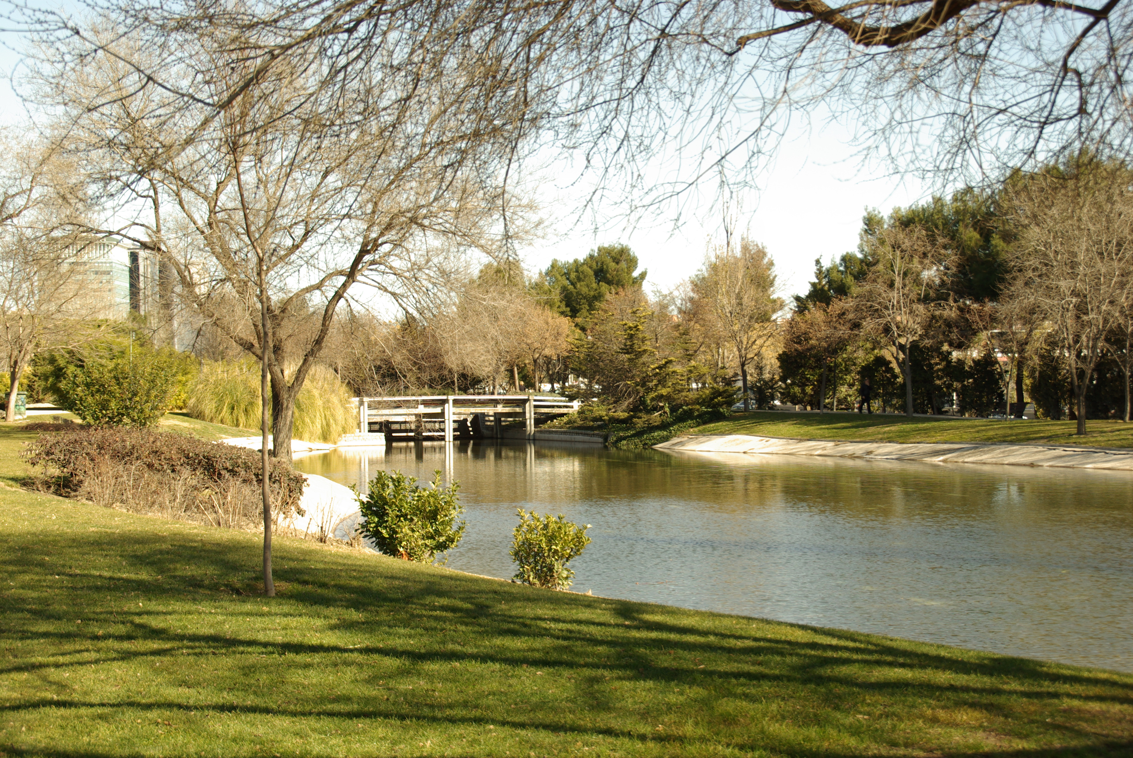 S.D. MADRID PARQUE TIERNO GALVAN - ZOOMVISION - ESTANQUE 2